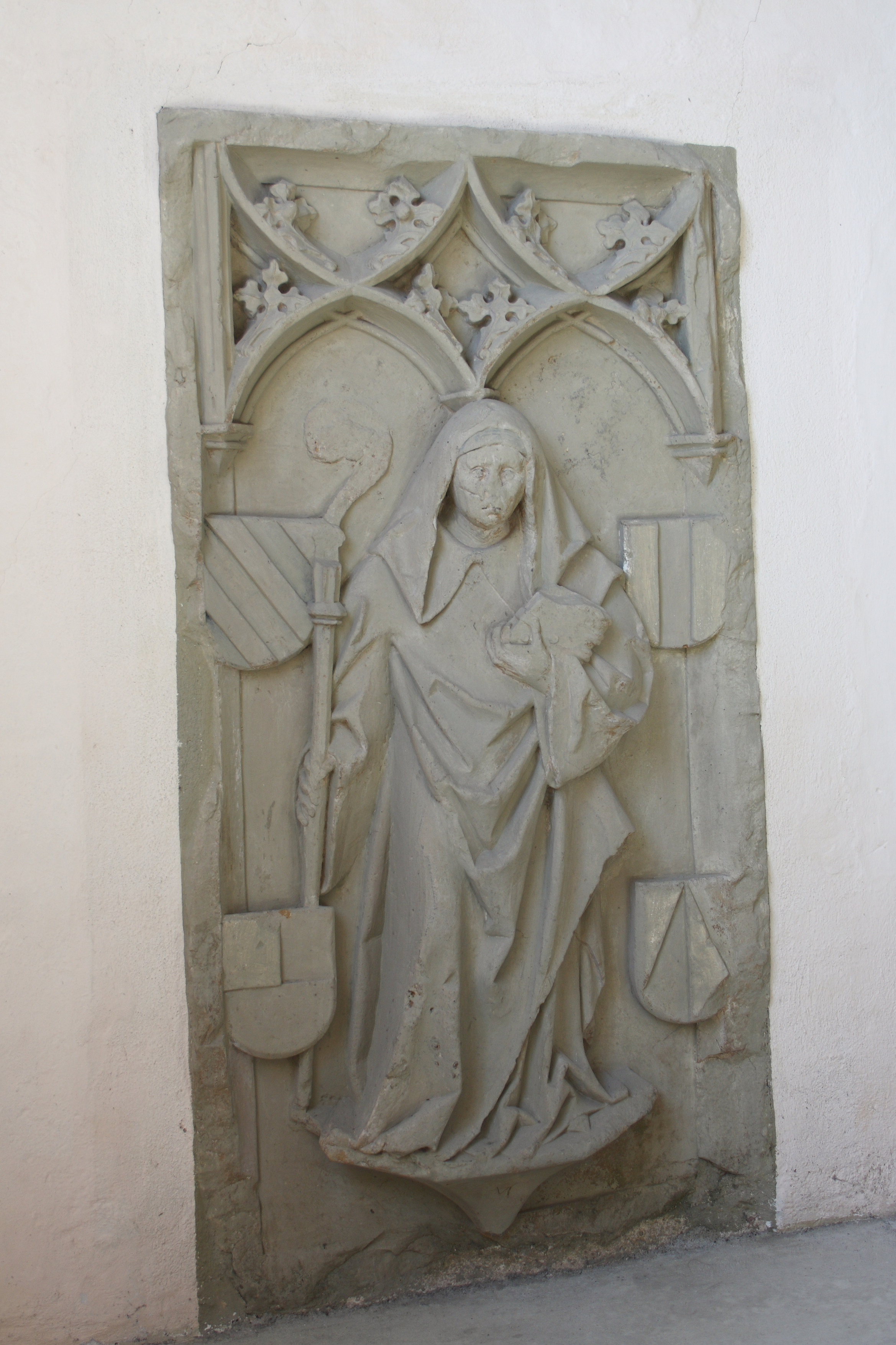 Evangelische Pfarrkirche, ehemalige Benediktinerklosterkirche St. Maria in Auhausen im Landkreis Donau-Ries (Bayern), Grabmal des Abtes Georg von Schechingen (1450−1481), Ende 15. Jahrhundert